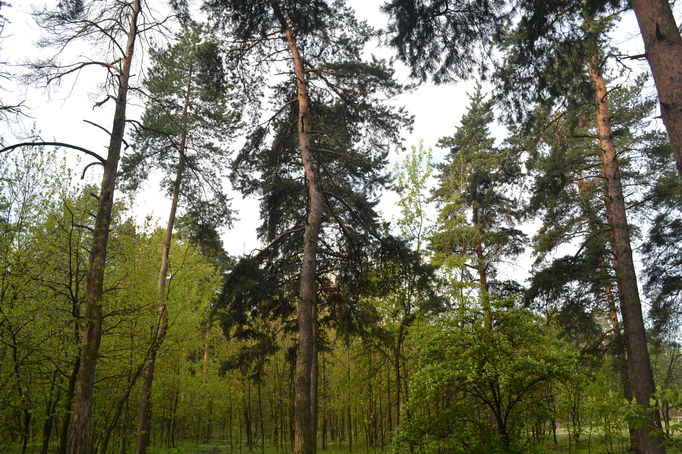 Весенний лес